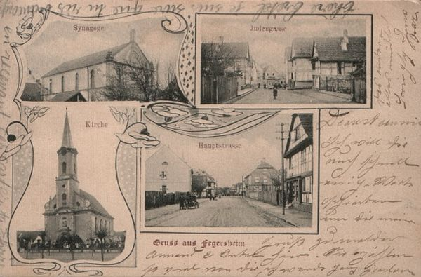 Ansichtskarte von Fegersheim im Elsass